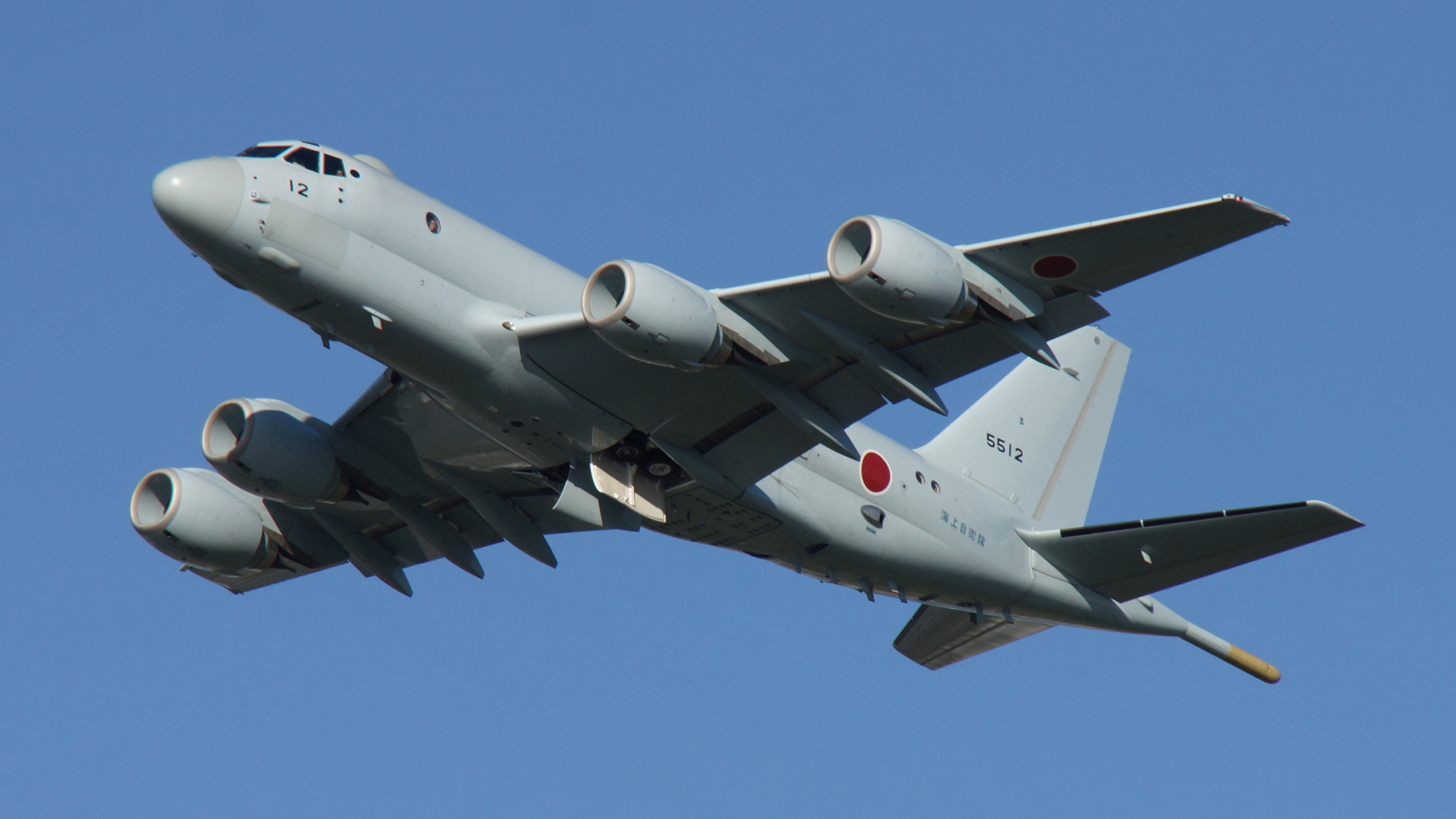 海上自衛隊 飛行するP-1哨戒機（5512号機）。2017年9月30日 徳島航空基地にて。